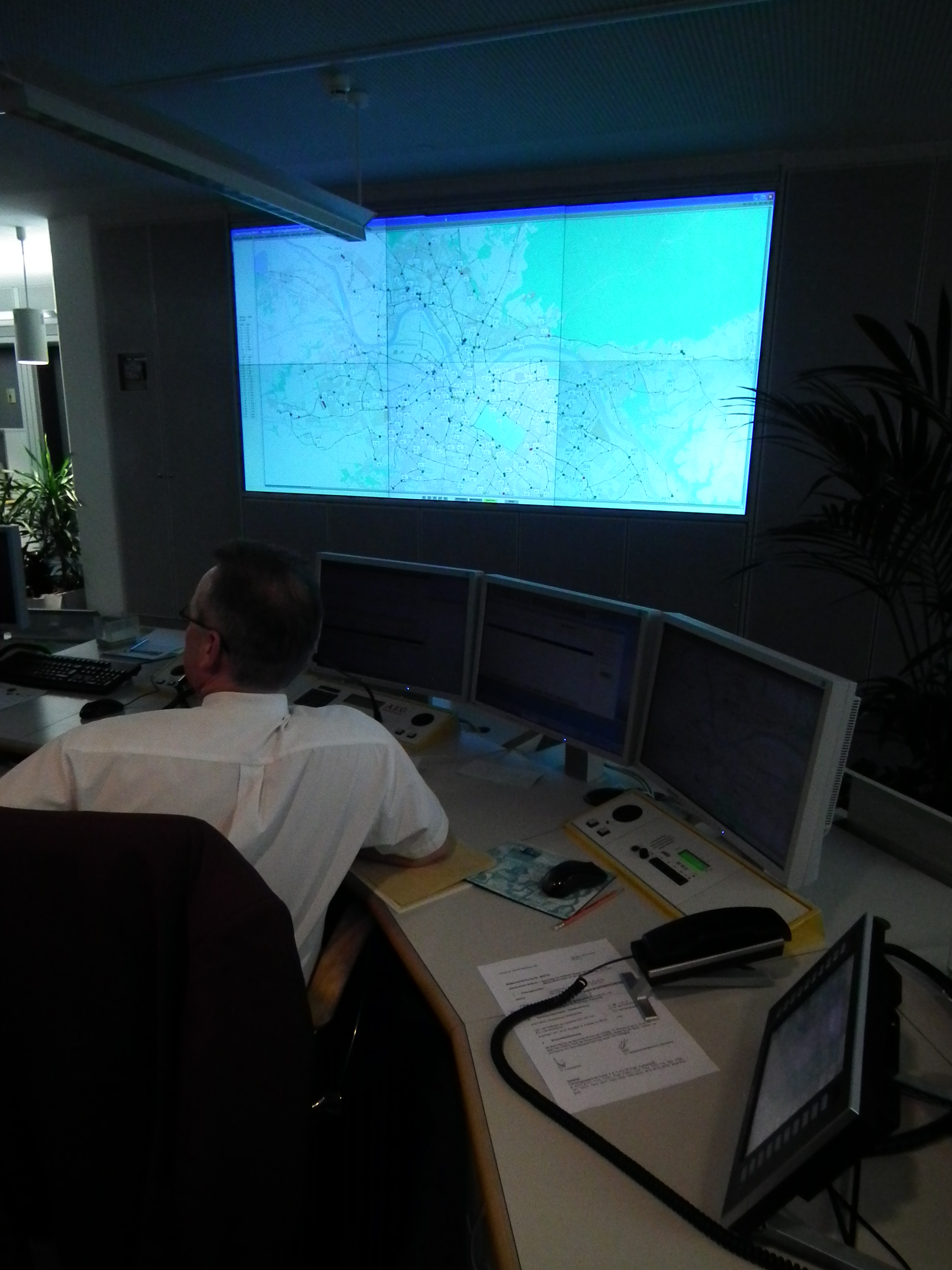 Betriebsleitstelle der Dresdner Verkehrsbetriebe AG in Trachenberge; Arbeitsplatz des Disponenten für den Straßenbahnverkehr